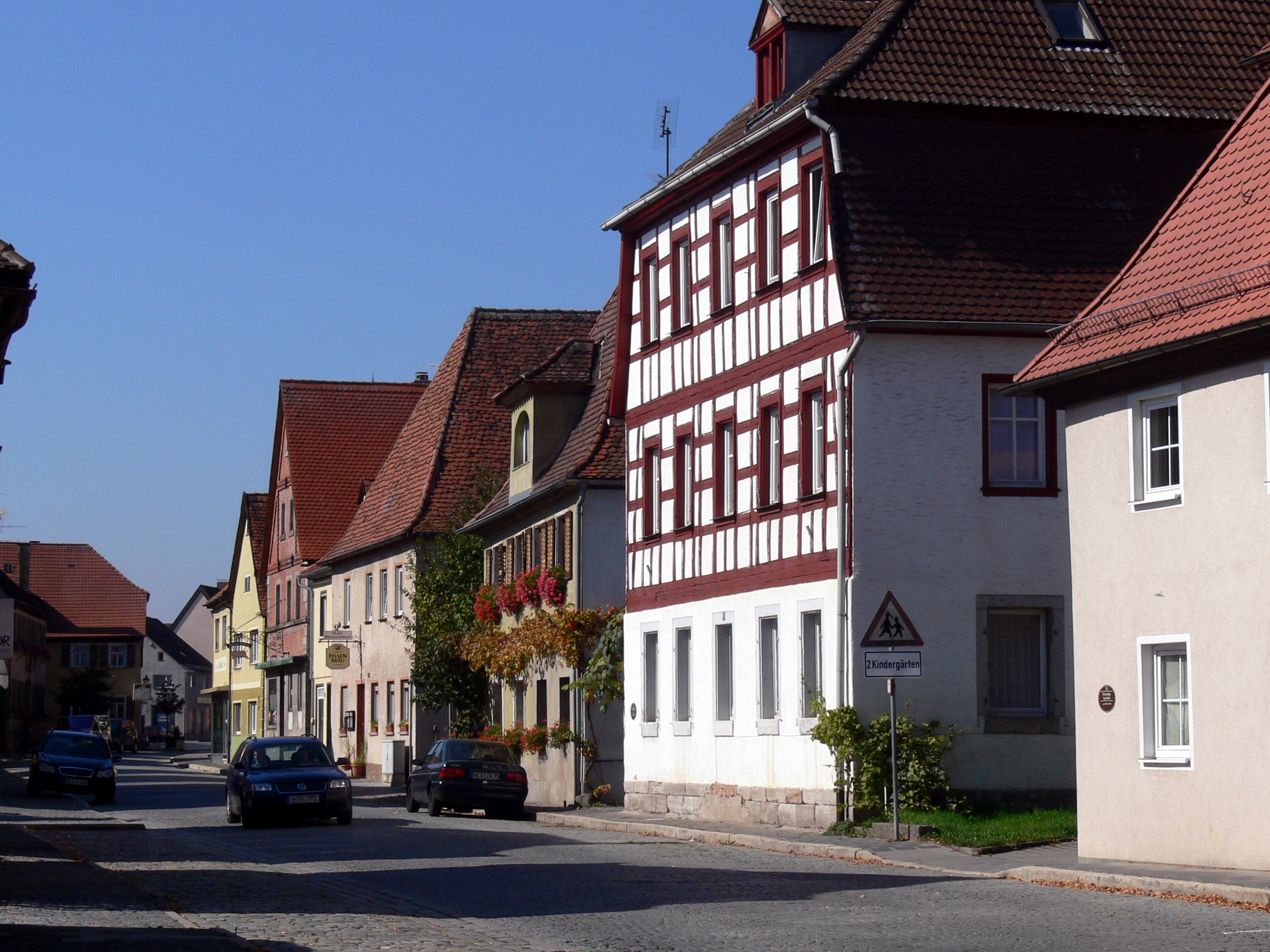 Hauptstraße mit Fachwerkhäusern in Markt Erlbach.